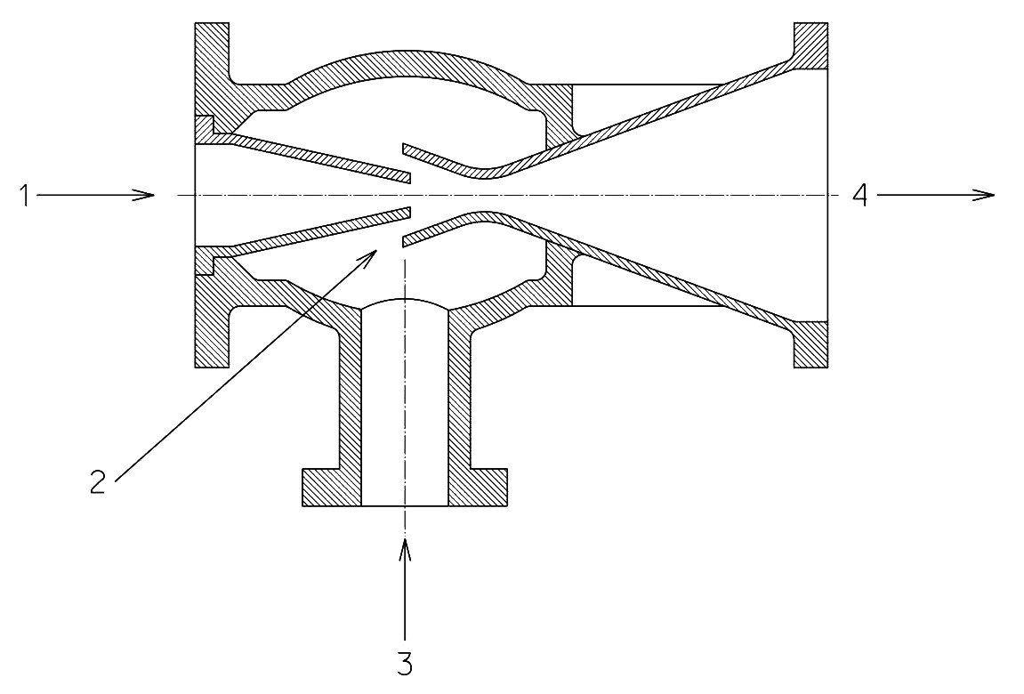 Strumienica (maszynoznawstwo) Pawel Wajda, 2004